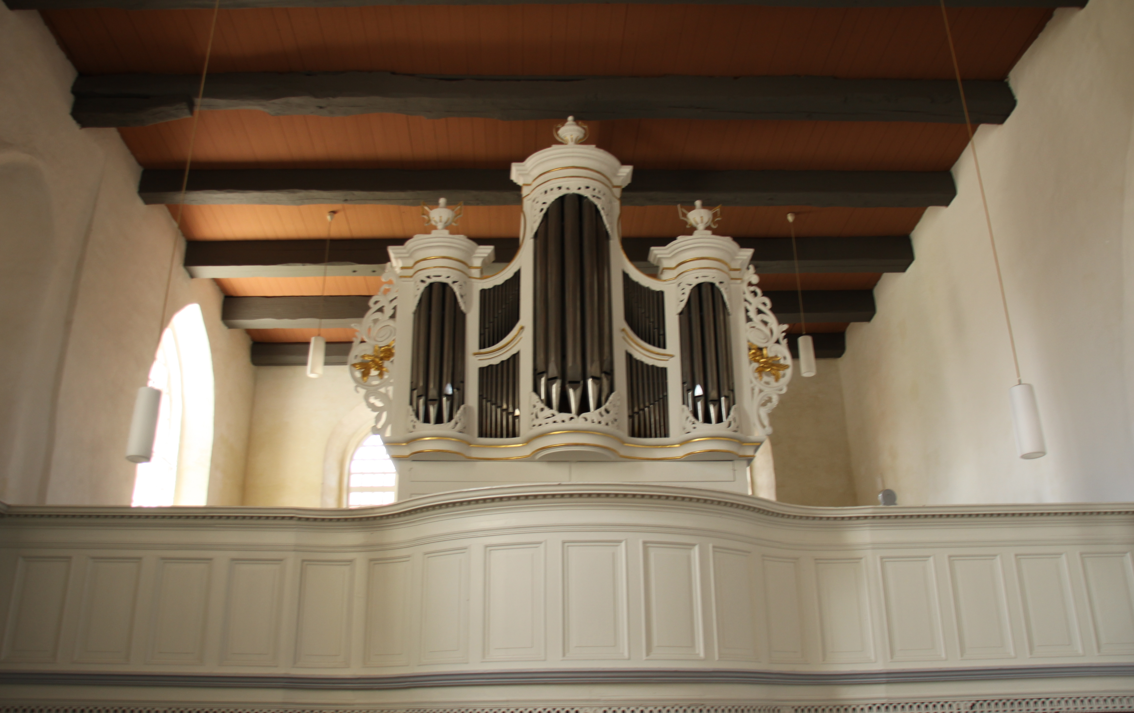 Orgel der Loquarder Kirche